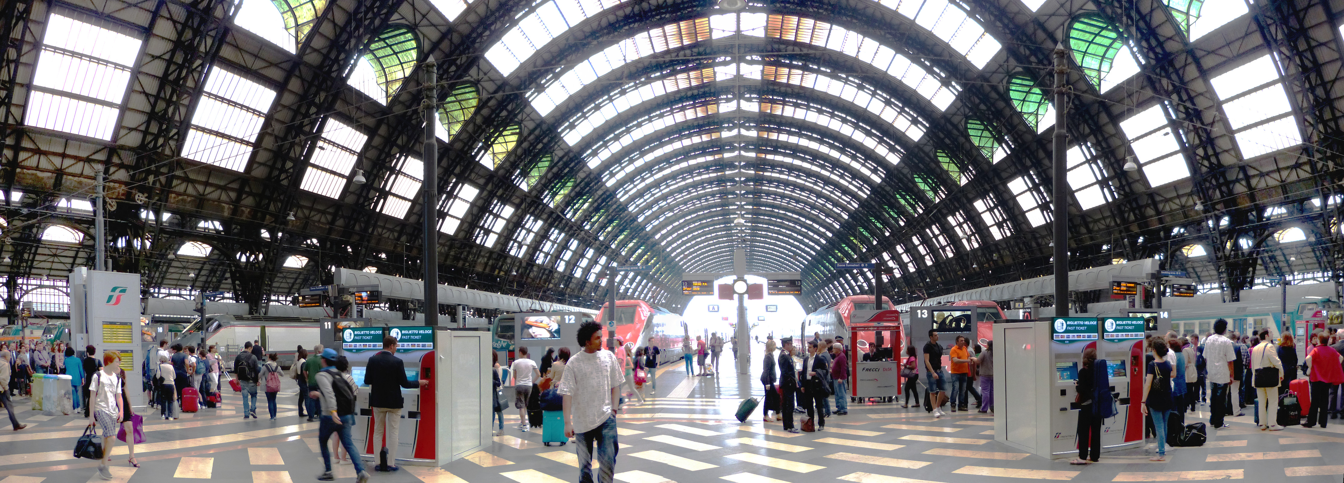 Stazione di Milano Centrale / Mailand Hauptbahnhof